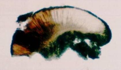 Sarcogyne regularis